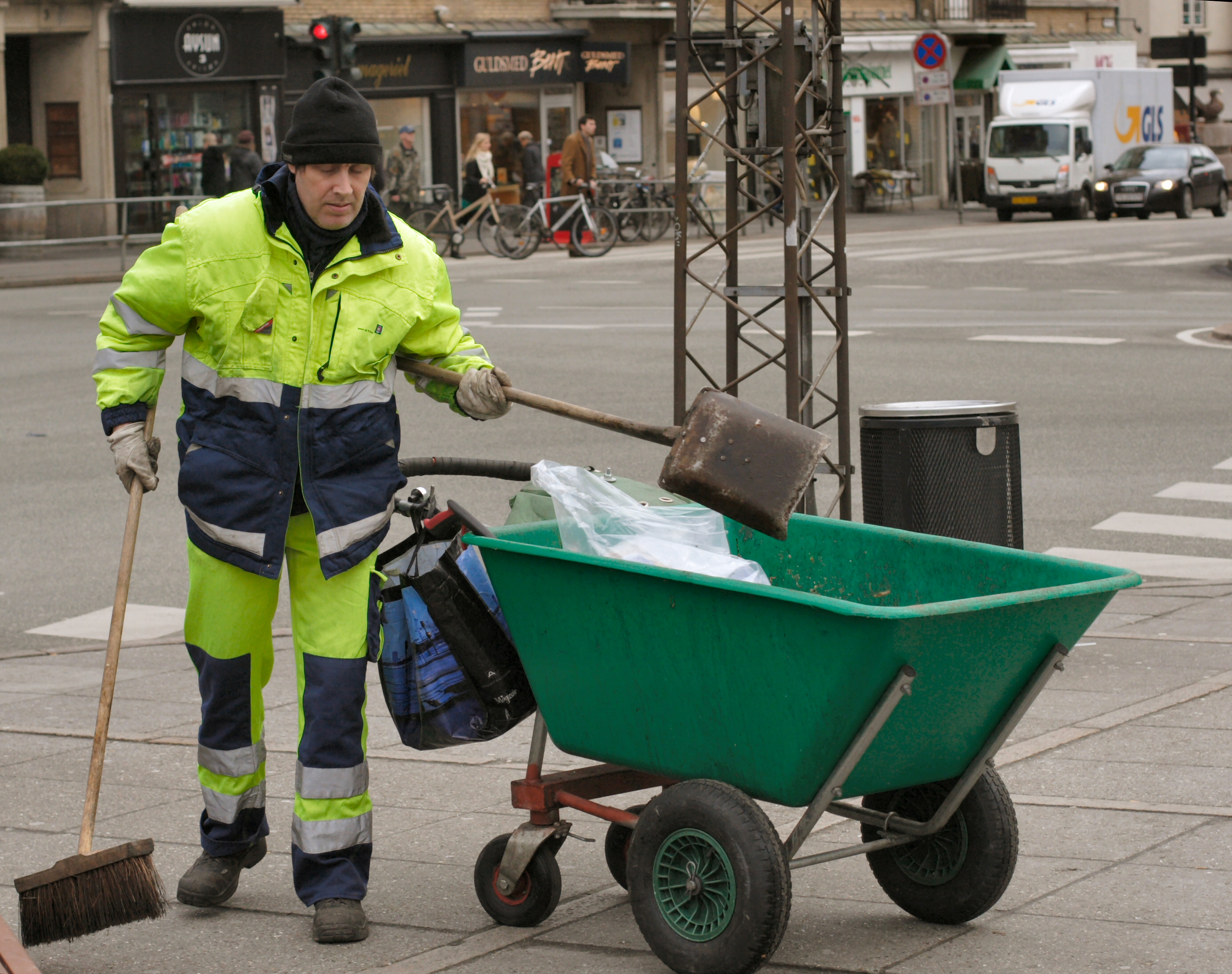 Gadefejer på Rådhuspladsen i Århus